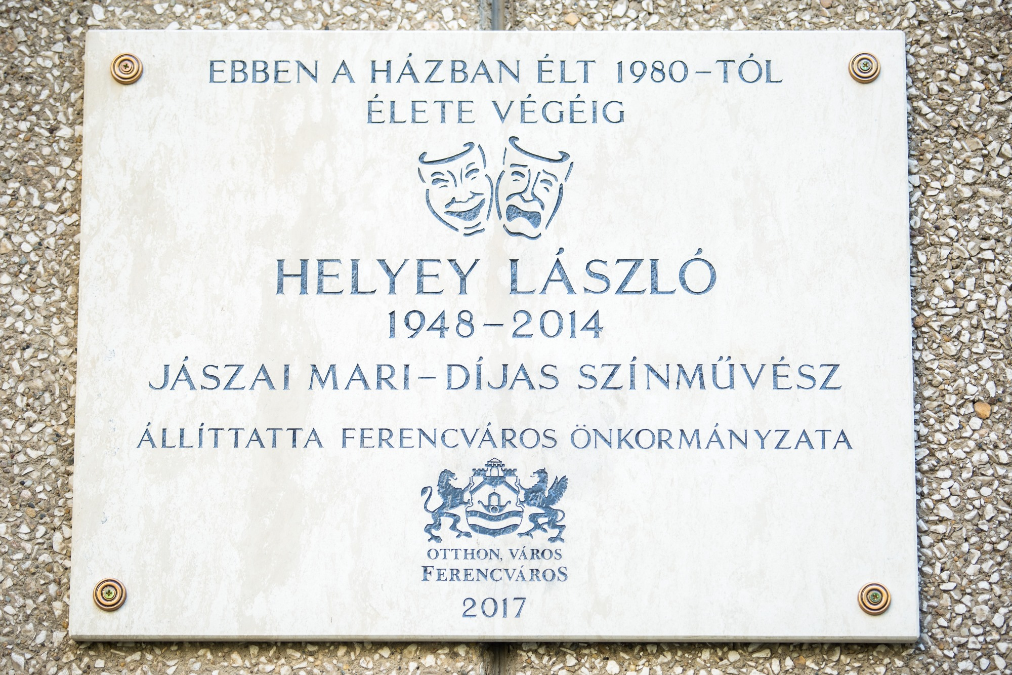 Helyey László Jászai Mari-díjas magyar színművész emléktáblája az Ifjúmunkás u. 24. szám alatt